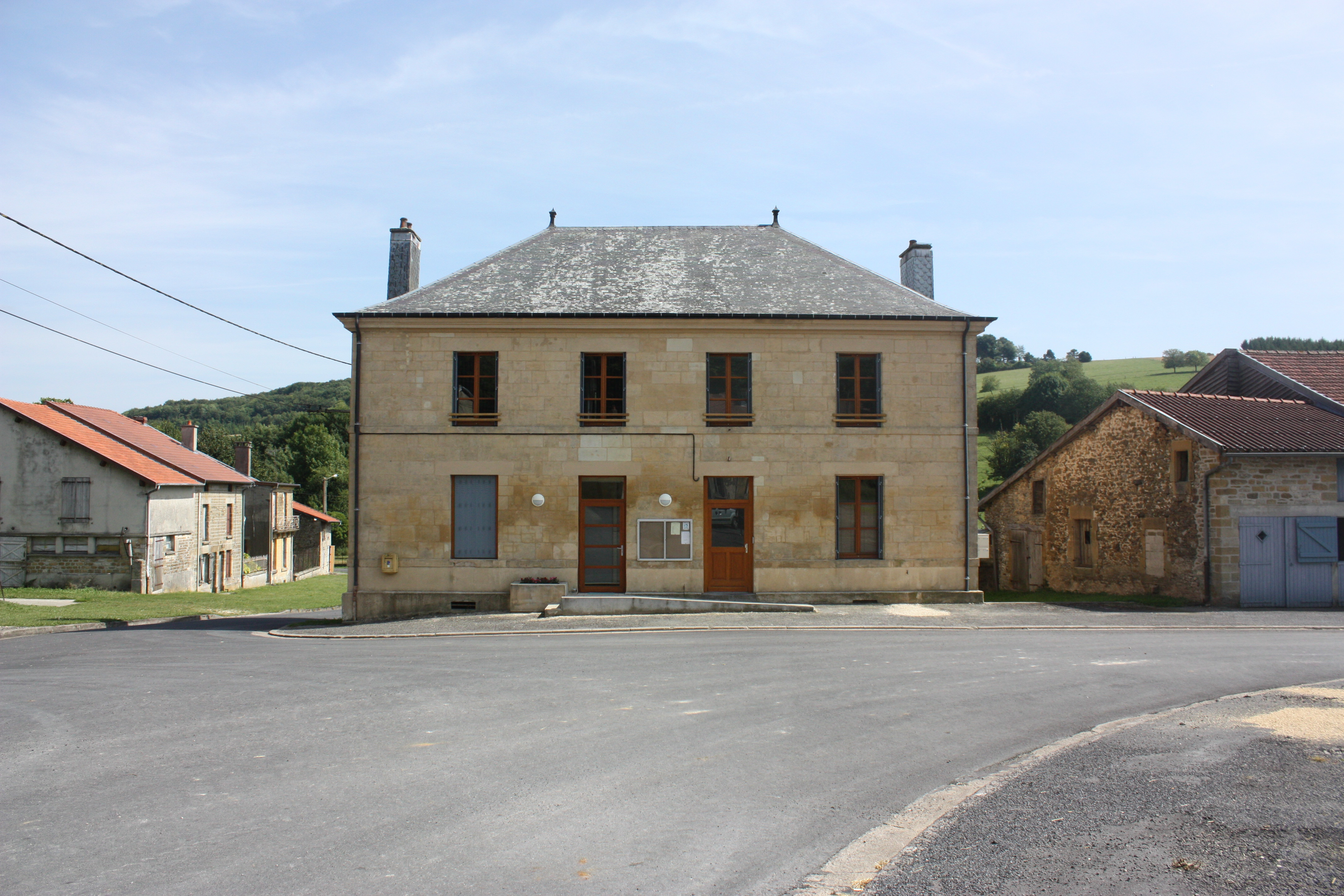 Village Ardennais